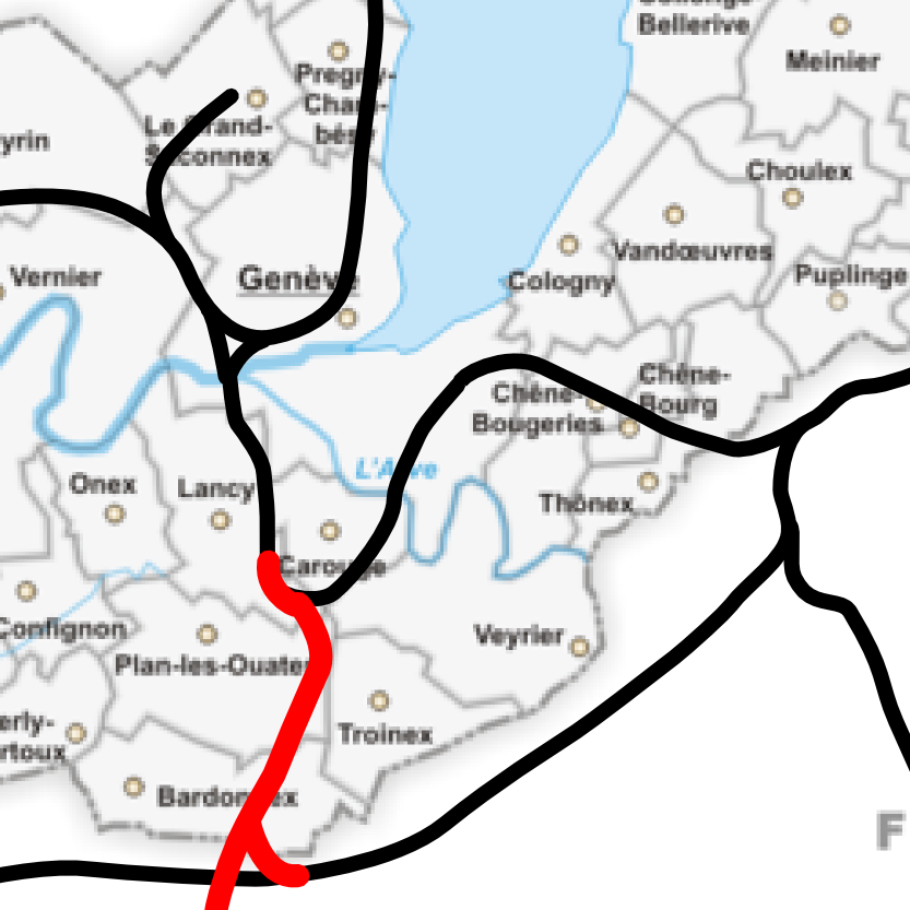 Tracé du CEVA à Genève, Suisse : « Barreau Sud », variante au tracé du CEVA à Genève, Suisse